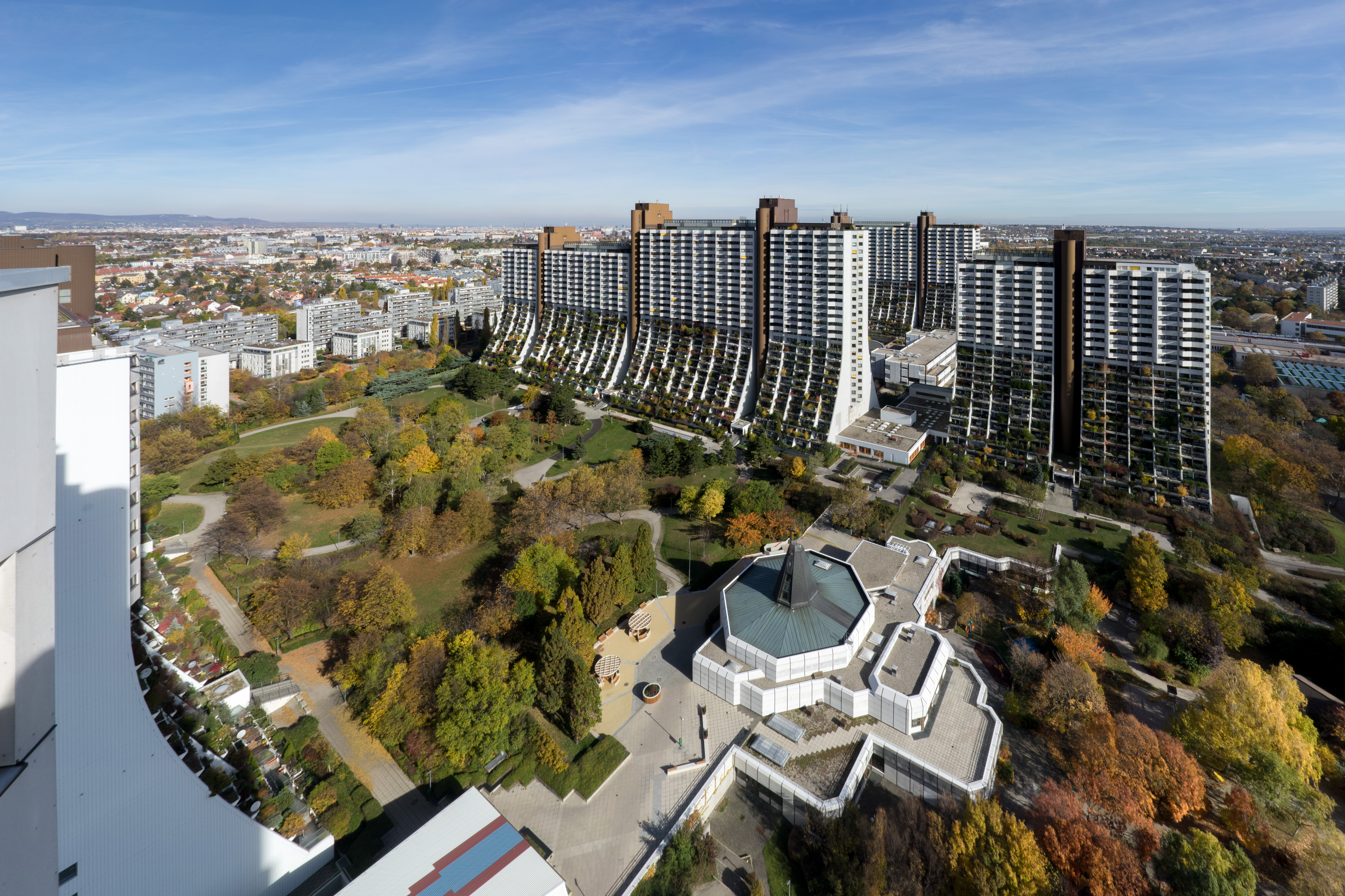 Wohnpark Alterlaa Dachblick von Block C1 Im Vordergrund die Wohnparkkirche. Dahinter Block B.